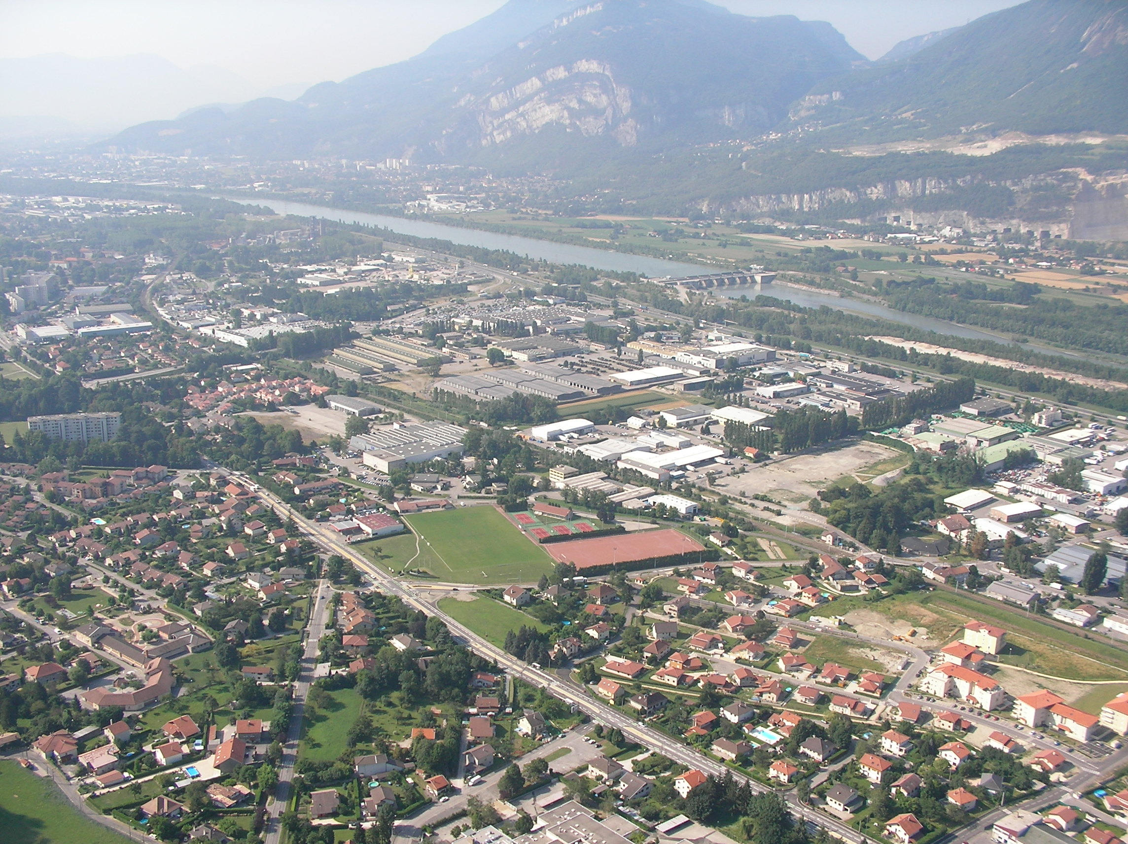 Vue générale du Fontanil